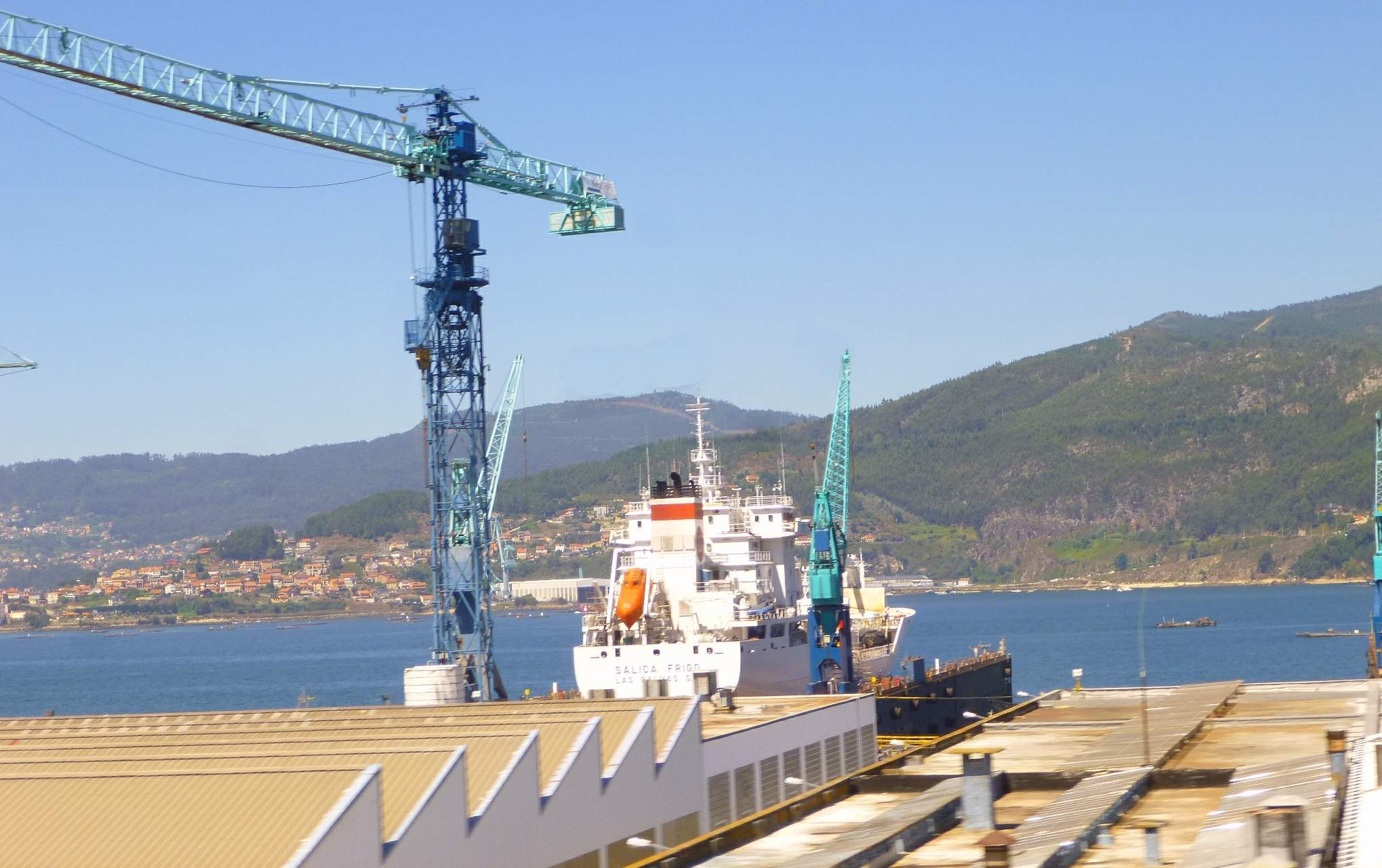 Vigo - Puerto comercial